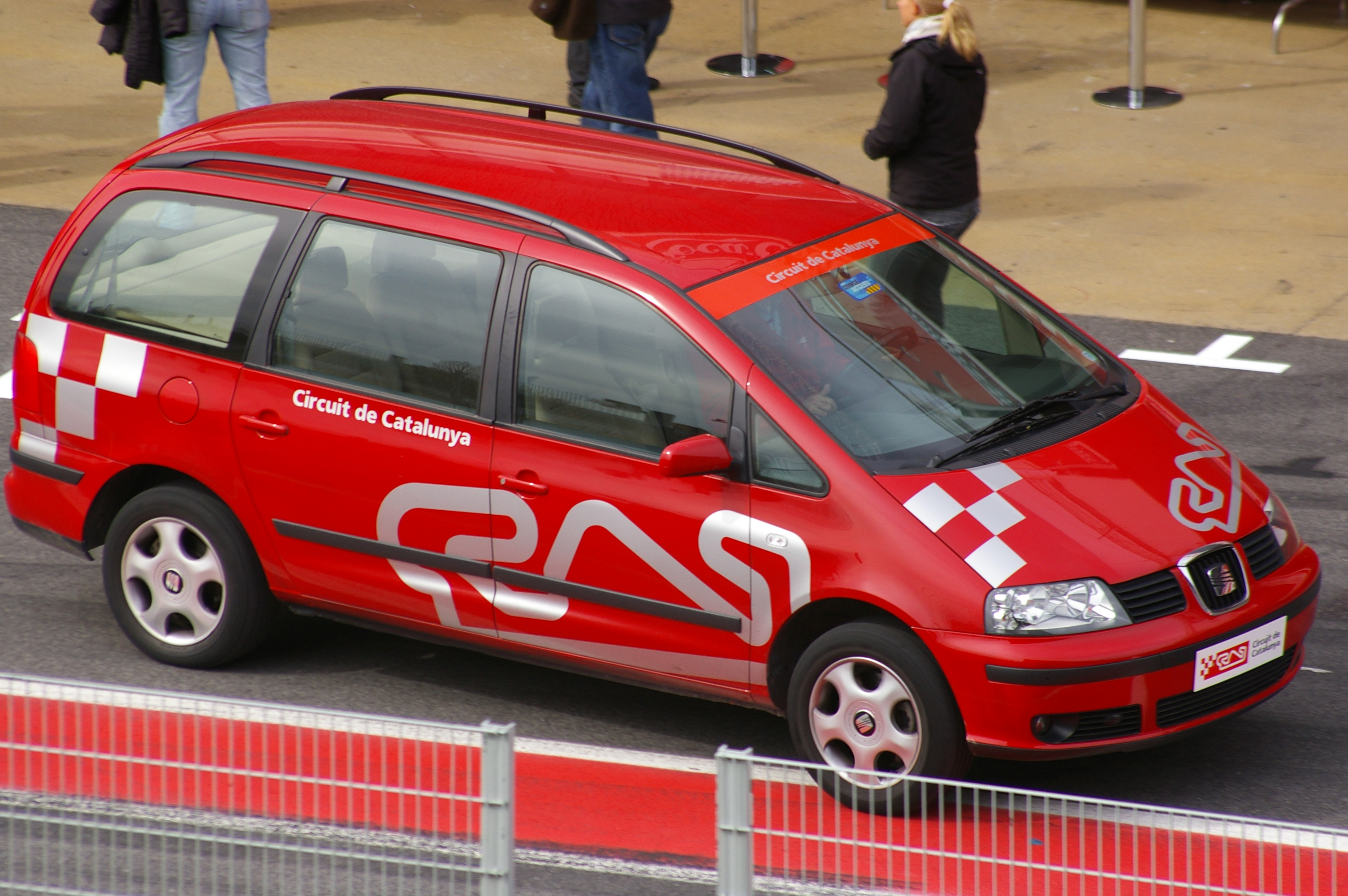 SEAT Alhambra del Circuit de Catalunya (Montmeló, Vallès Oriental)